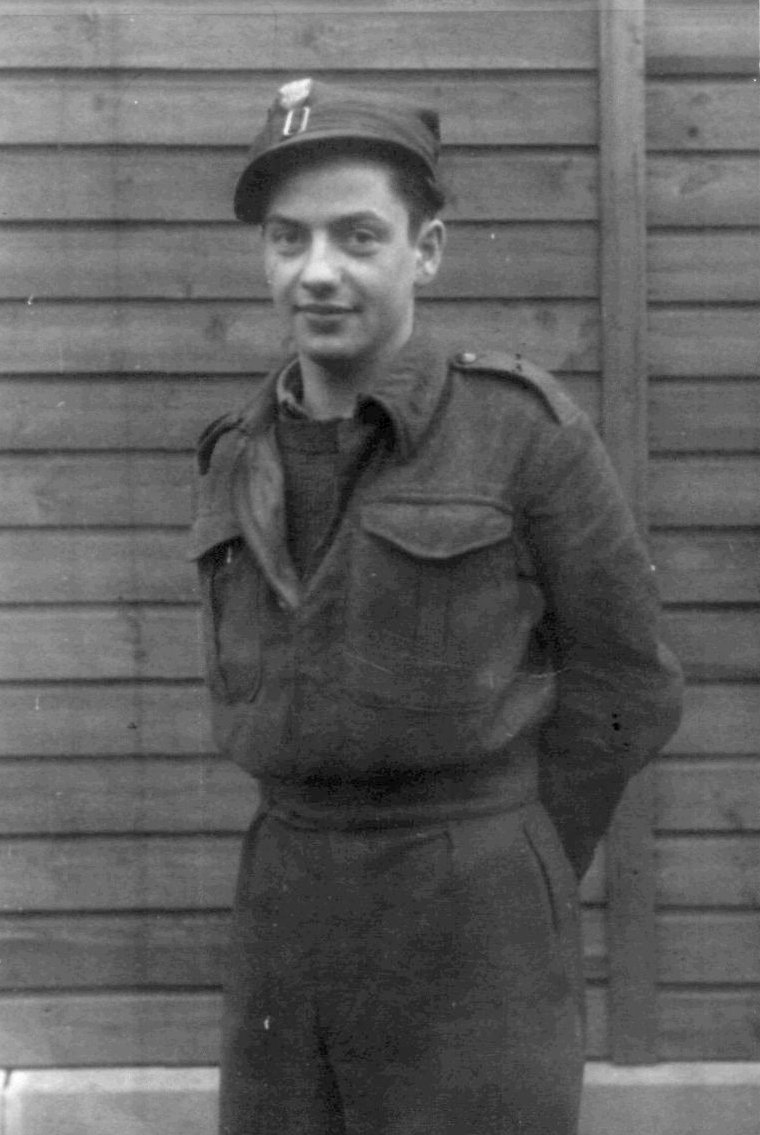 jeniec plut. pchor. Henryk Zieliński, fotografia z obozu jenieckiego Sandbostel (Stalag X B), 5 lutego 1944 r. Zdjęcie pochodzi z archiwum rodzinnego. Umieszczone w Wikipedii przez Juliusza Zielińskiego - syna Henryka, bez zastrzeżenia prawa autorskiego.